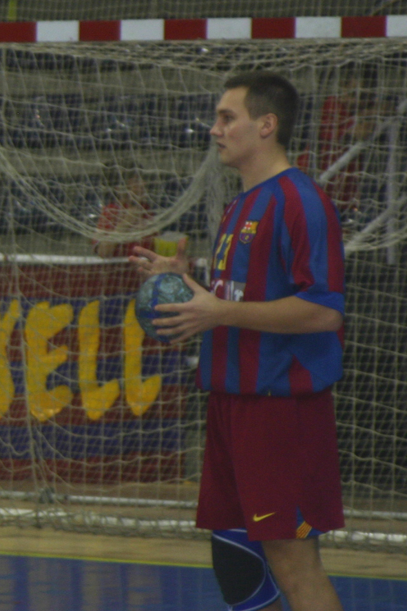 Luka Zvizej, jugador d'handbol eslovè. Fotografia del dia 5 de novembre de 2005, en un partit de la Lliga Europea al Palau Blaugrana de Barcelona.